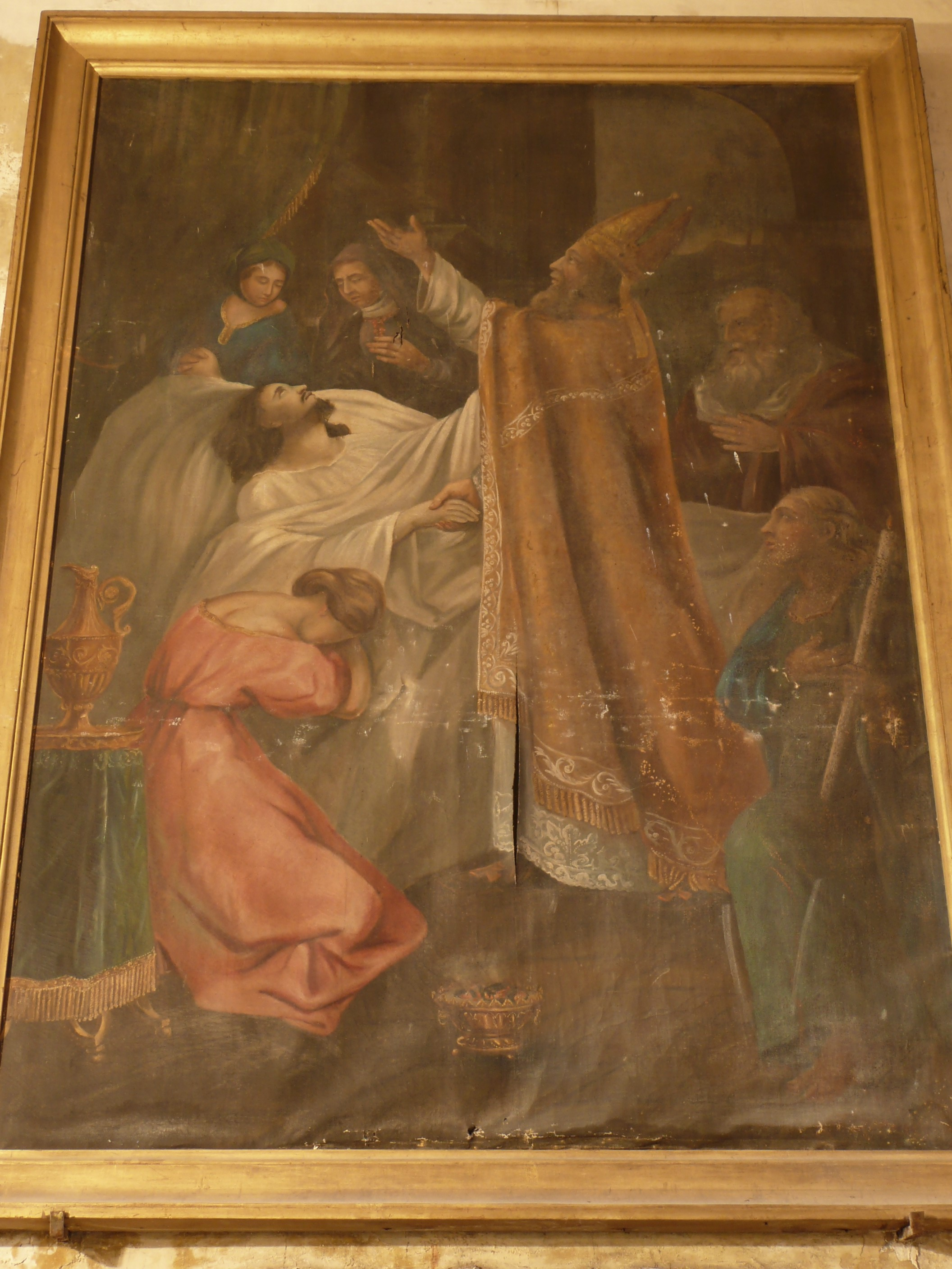 Arles (Bouches-du-Rhône, France), église St Césaire dans le quartier de la Roquette, ancienne église conventuelle des Grands-Augustins, commencée en 1258, remaniée à plusieurs reprises au cours des siècles, seule paroisse de ce quartier et troisième église de la ville ancienne encore utilisée. Dans la chapelle Ste Thérèse de l'Enfant-Jésus, tableau du 19e siècle par Jean-Baptiste Marie Fouque, St Césaire au chevet du préfet de Ravenne.